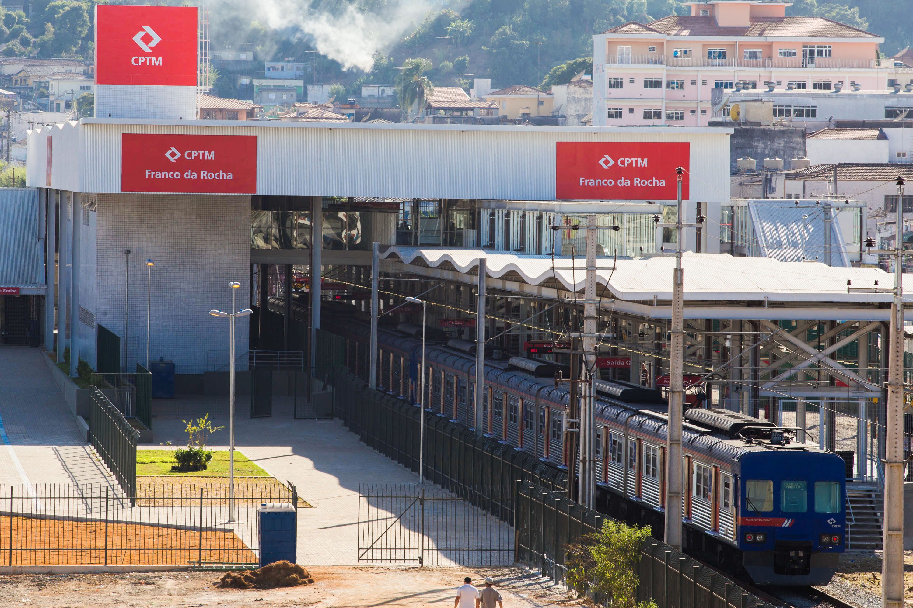 O governador Geraldo Alckmin Participa da Inauguração da Nova Estação da CPTM Franco da Rocha, Assina Autorizo para Liberação de Recursos FUMEFI, Entrega de Ônibus Escolares e Assinatura de Autorizo da Construção de dois Piscinões para Franco da Rocha, São Paulo.